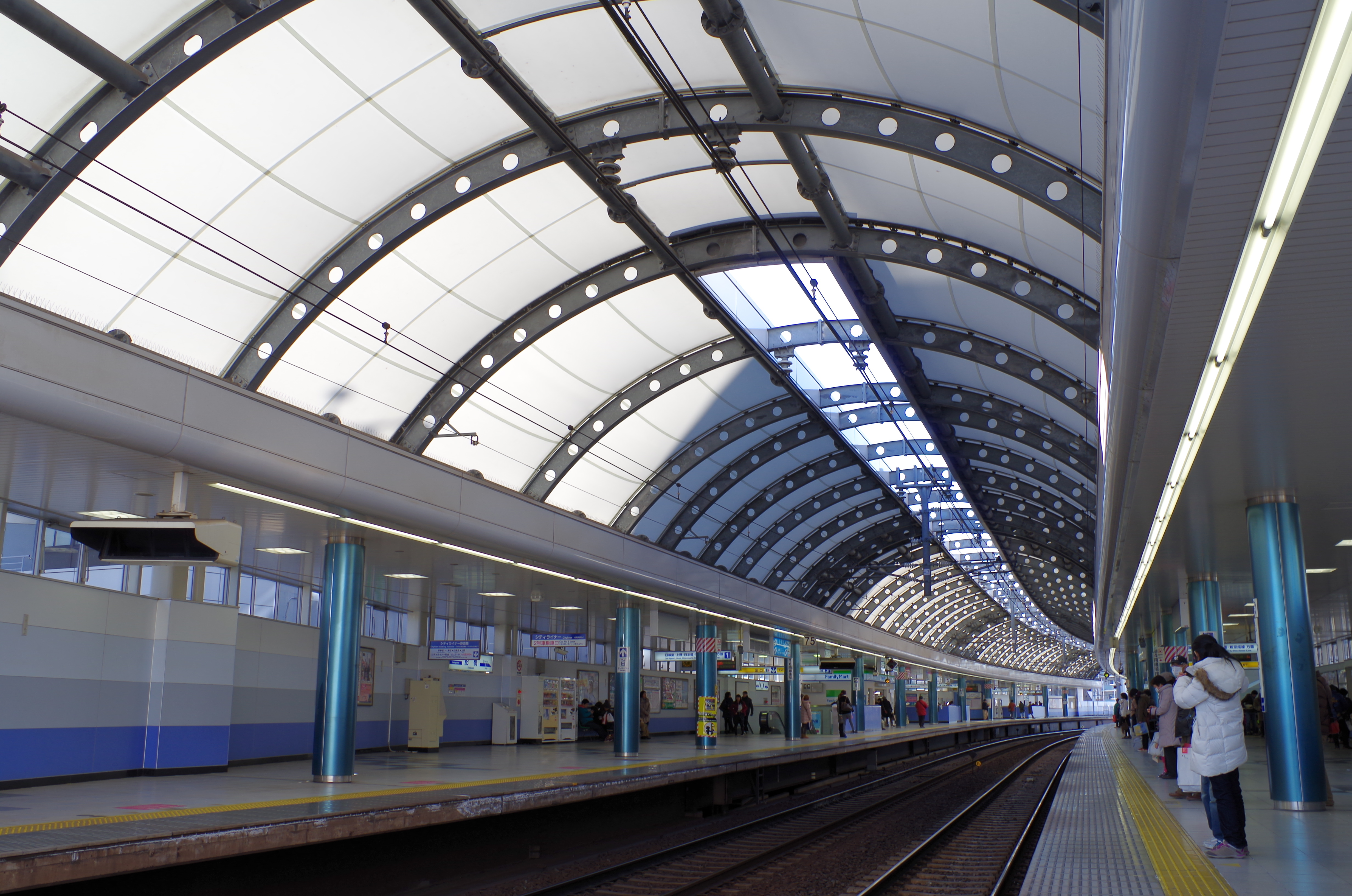 京成船橋駅 2015.1.02